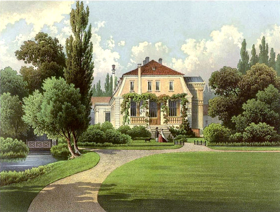 Rittergut Theessen, Kreis Jerichow I, Provinz Sachsen